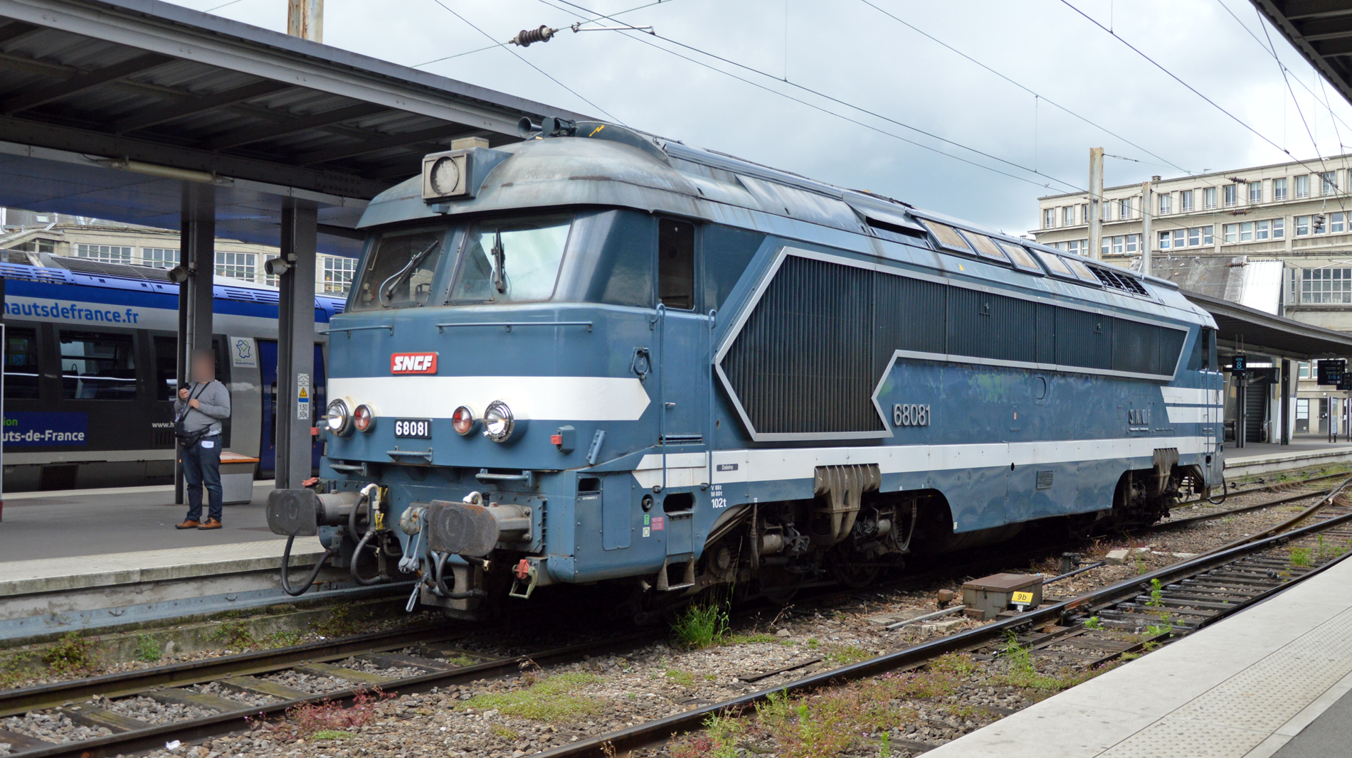 A1A A1A 68081 en gare d'Amiens